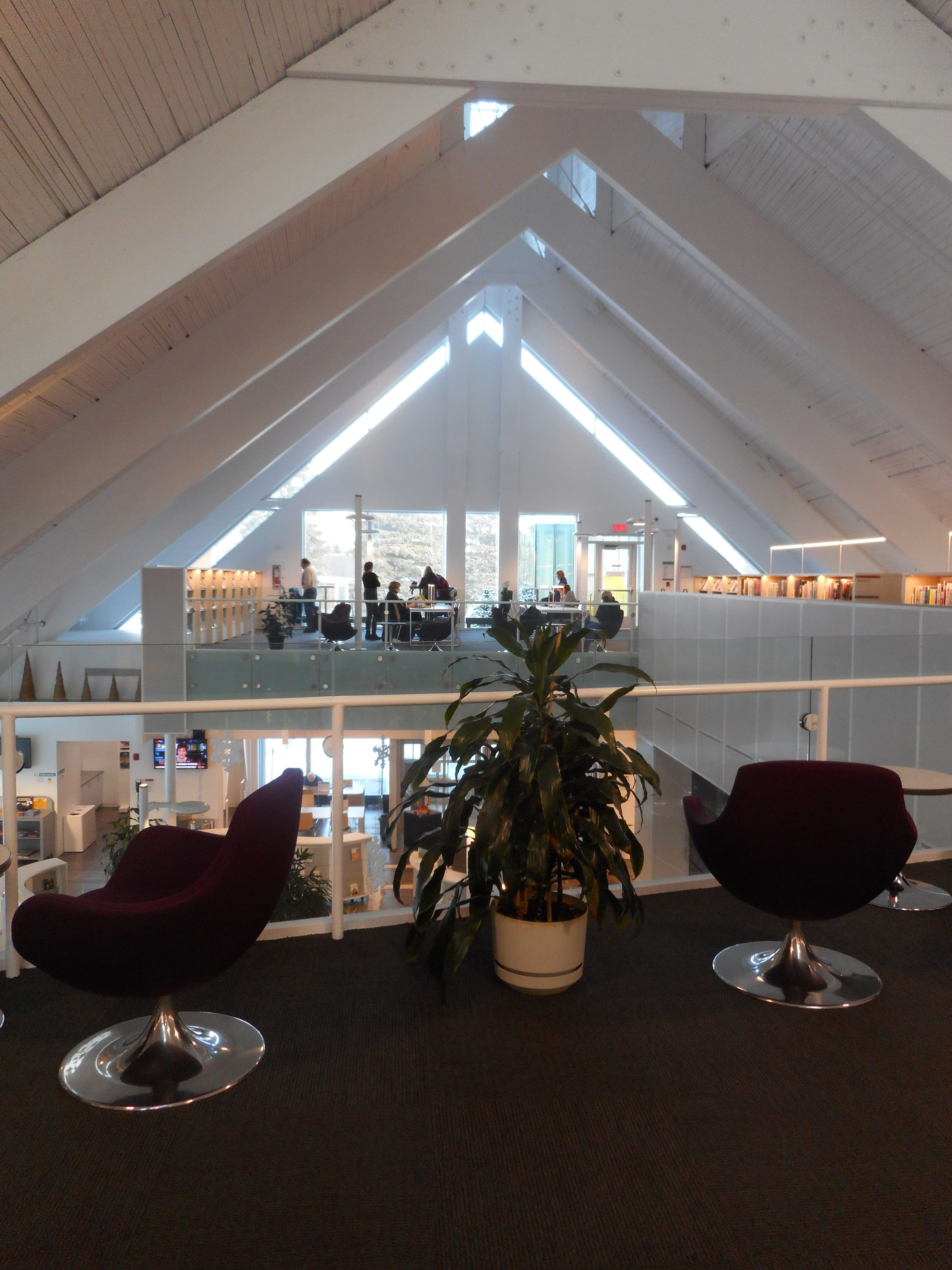 Bibliothèque Monique-Corriveau, 1100, route de l'Église, Québec Le 30 novembre 2013, « L'église Saint-Denys-du-Plateau est officiellement passée de lieu de culte à lieu de culture, jeudi, alors que la nouvelle bibliothèque Monique-Corriveau a été inaugurée en ses murs. » – lapresse.ca